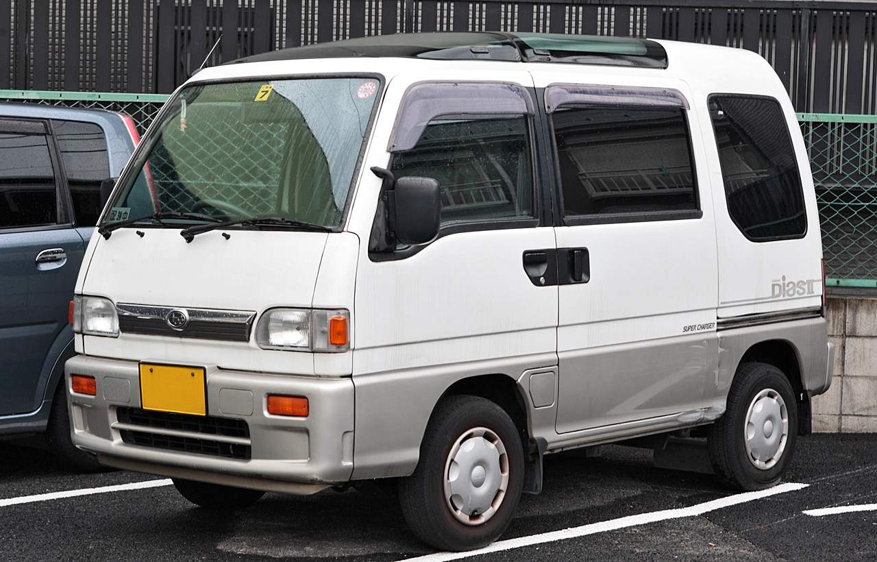 Subaru Sambar Dias II Sun-sun roof Supercharger